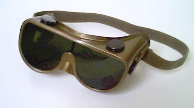 Eenvoudige lasbril voor autogeen lassen. Eigen foto, januari 2005. Simple gas welding goggles. I took this picture myself. Januari 2005. public domain.